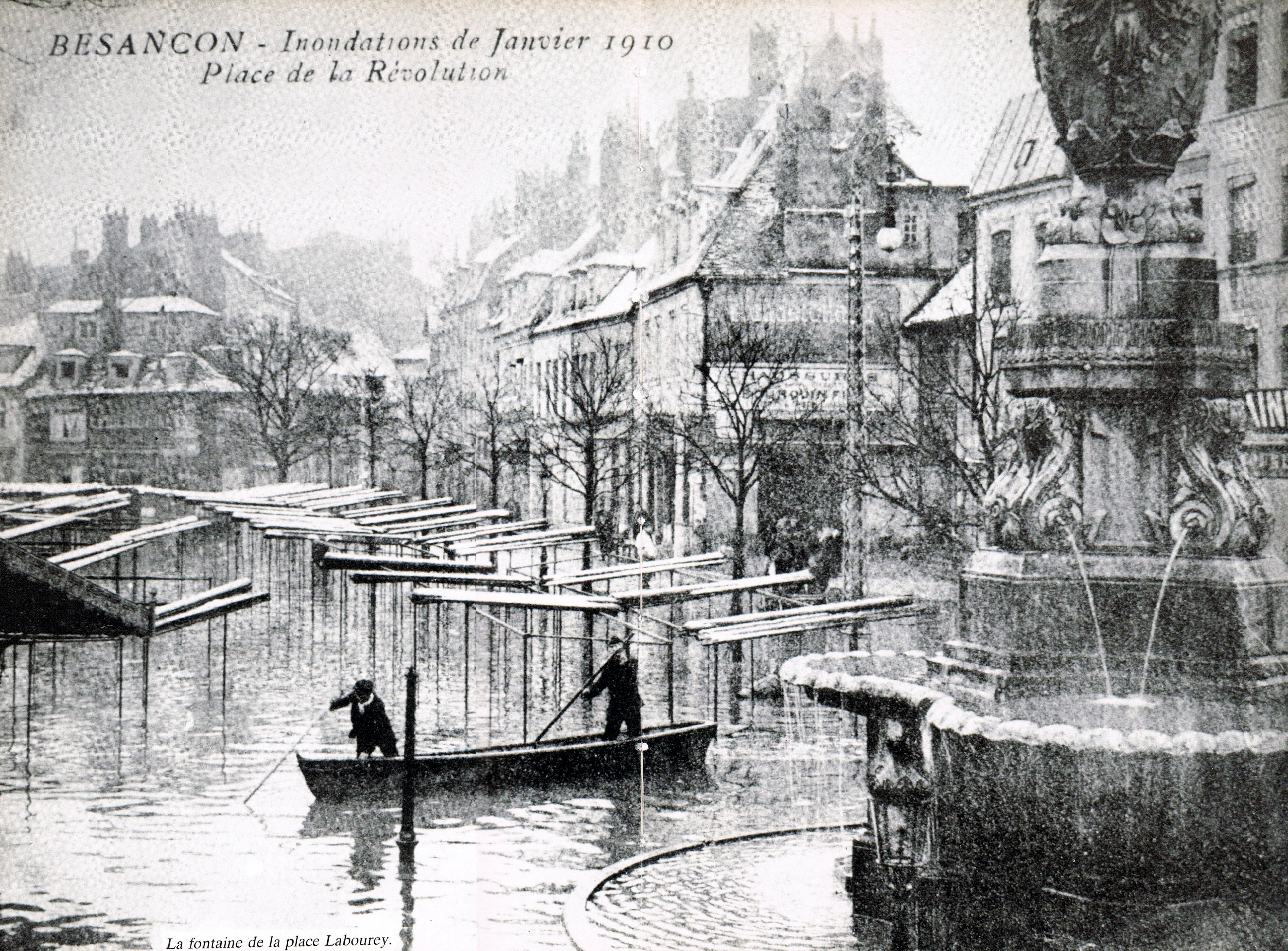 La place de la Révolution lors de la crue du Doubs de 1910 à Besançon (Doubs, France).